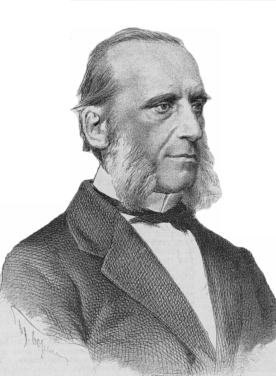 Долгоруков Сергей Алексеевич, русский государственный деятель